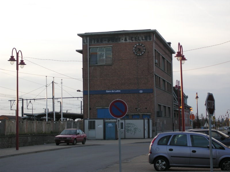 Ancienne gare de Luttre - Pont-à-Celles